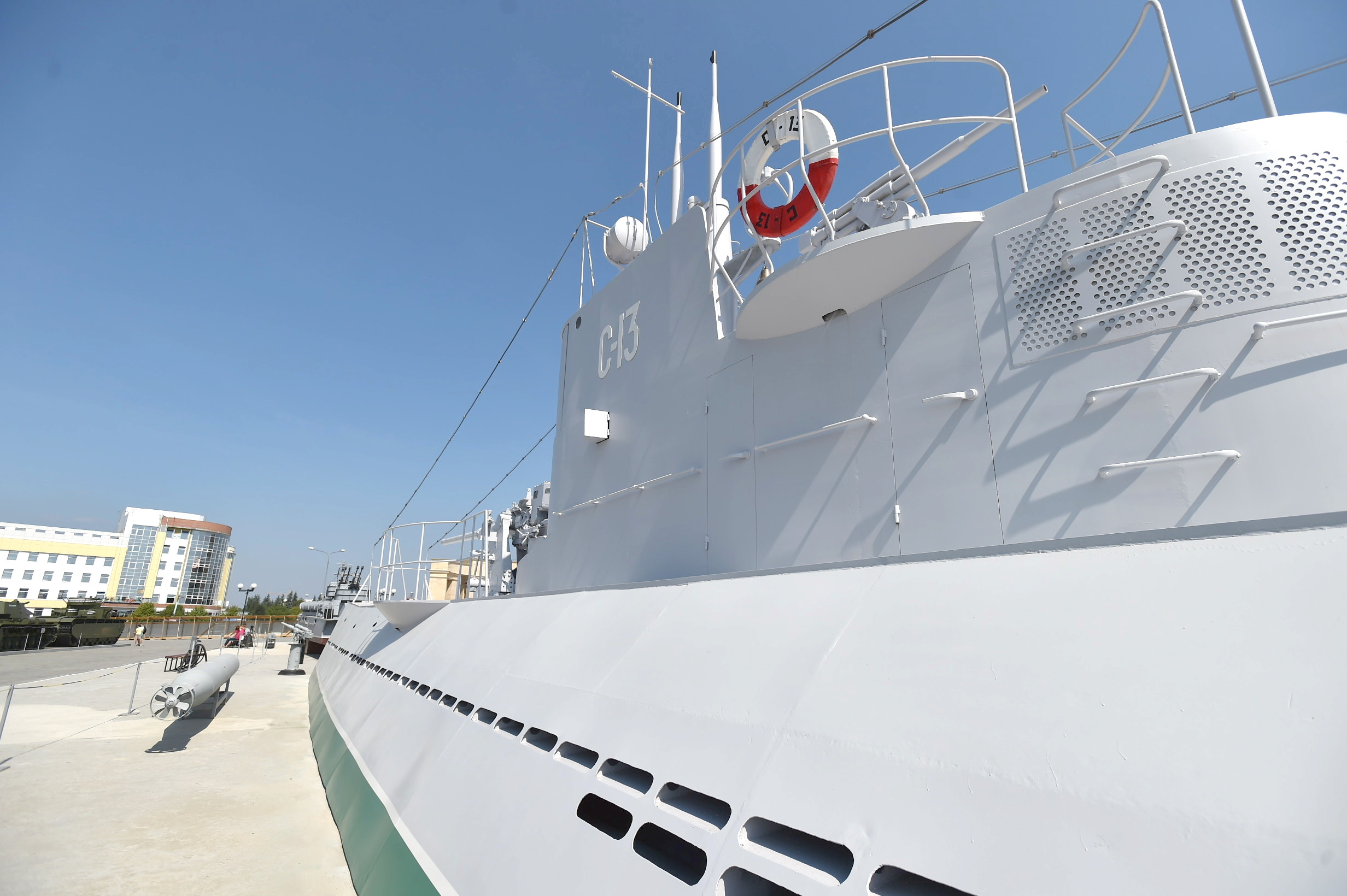 В 2018 г реплика подводной лодки С-13 была создана в Музее военной техники УГМК